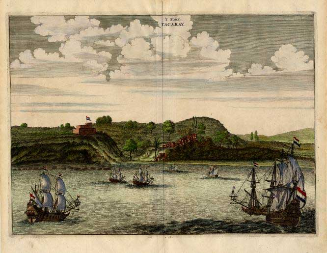 Former Dutch Fort Witsen in Takoradi, Ghana